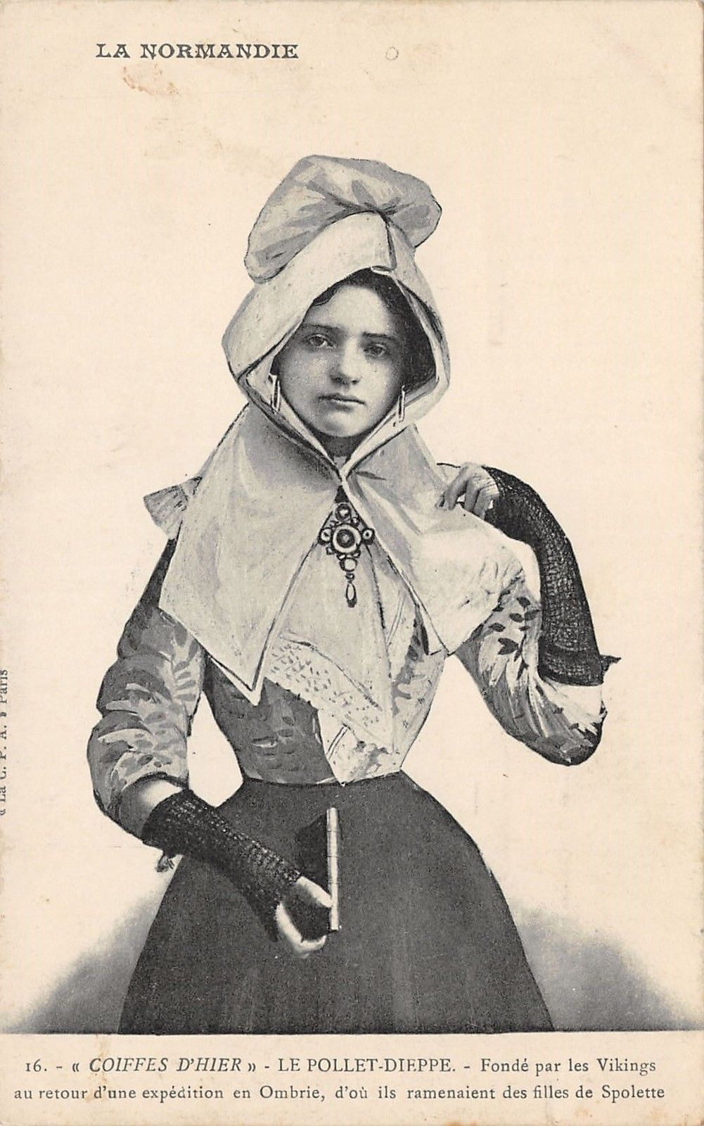 Coiffe de Dieppe.